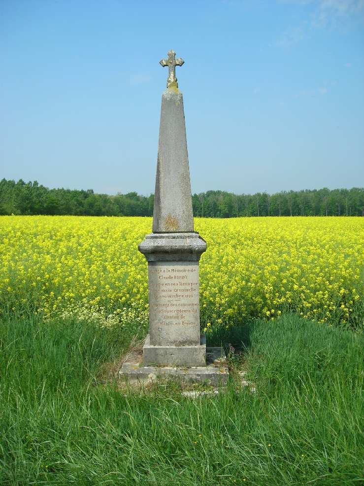 Monument Claude BURDY Guerfand